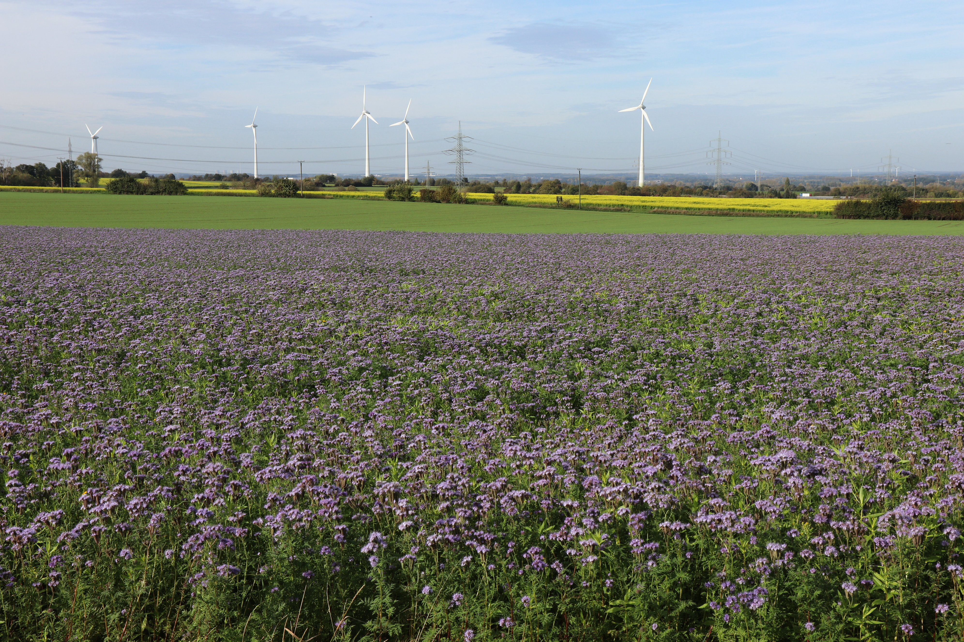 Feld mit Rainfarn-Phazelie (Phacelia tanacetifolia) in Ense, Soester Straße/Radberg. Blickrichtung Norden (Soest-Ostönnen).